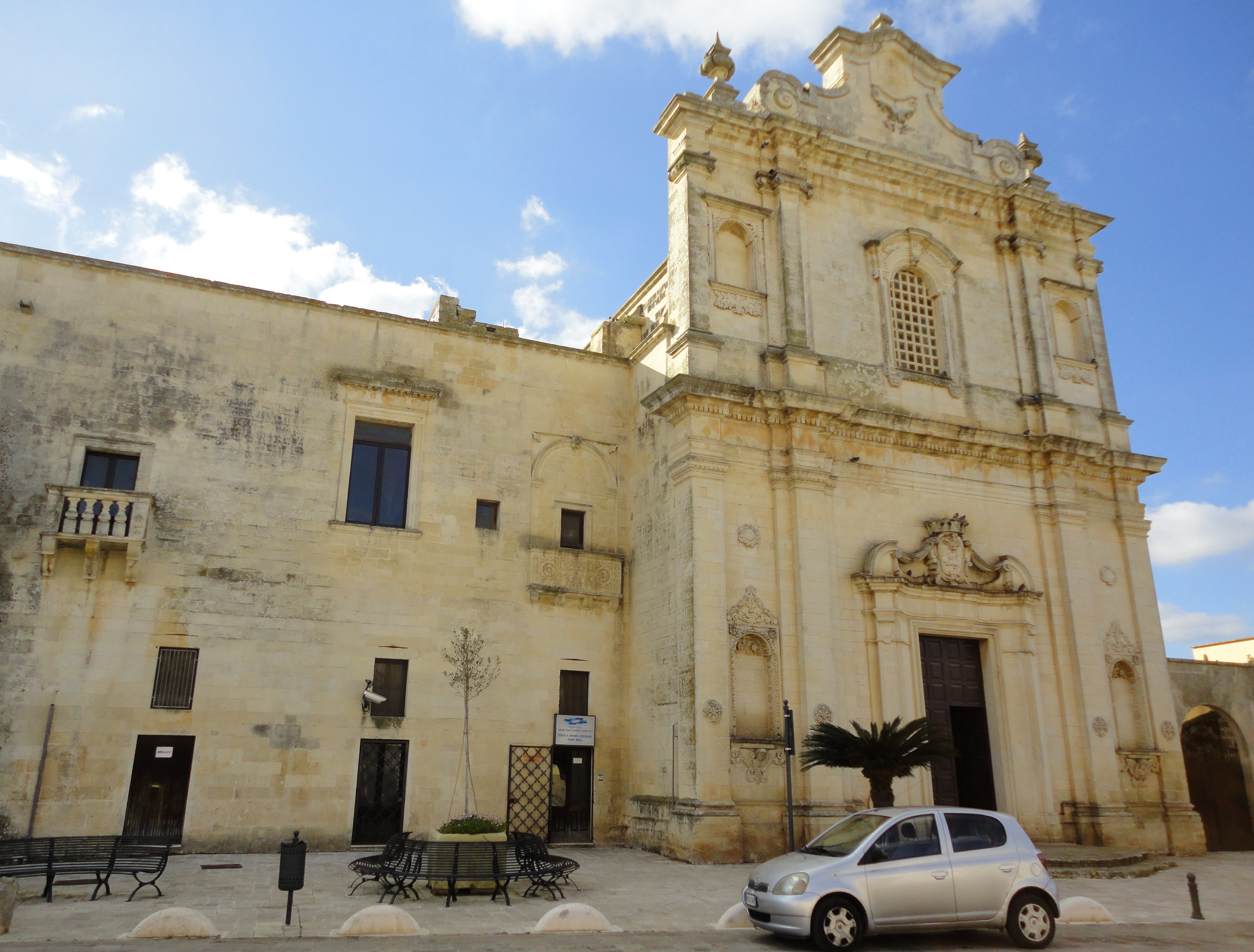 Chiesa di Santa Maria di Tricase Sternatia, Lecce